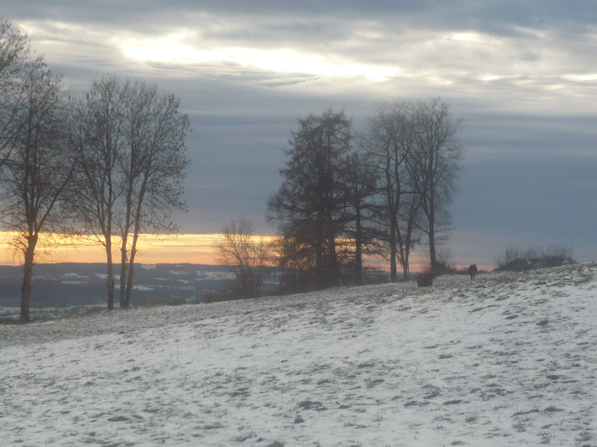 Vue hivernale du hameau d'Espériès, Commune de Giou-de-Mamou, Cantal